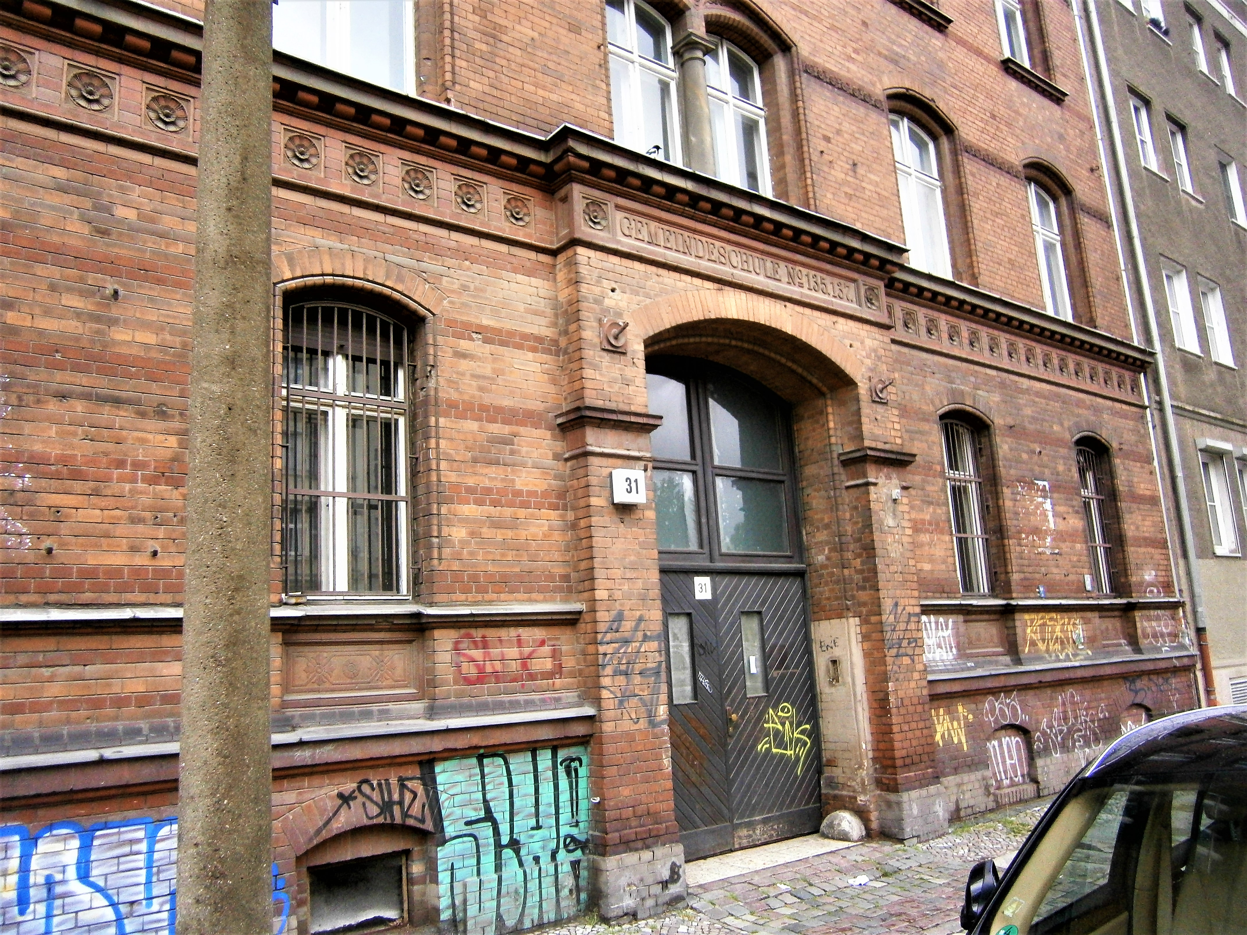 Die Friedenstraße ist eine Straße im Berliner Bezirk Friedrichshain-Kreuzberg, Ortsteil Friedrichshain. Angelegt und benannt wurde sie 1871-1876 auf dem Communicationsweg außerhalb der abgerissenen Berliner Zollmauer. Bereits seit dem Anlegen und der Bebauung bestand eine Teilung der Straße auf Königstadt und Stralauer Viertel. Aktuell sind es drei unterschiedene Straßenabschnitte: regionale Straßenverbindung im Barnimkiez am Volkspark Friedrichshain, am Platz der Vereinten Nationen als Parkzone, südlich im (Planungsraum) "Friedenstraße" als Ergänzungsstraße. Das Bild zeigt die Front des vormaligen Lehrwohnhaus, zwischenzeitlich Polizeireviers und zuünftigen Atelierhaus Friedenstraße 31.